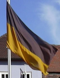 Foto der Landesflagge Baden-Württembergs. Selbst fotografiert im Oktober 2003 in Wertheim.